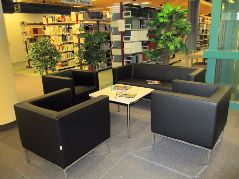 Universitätsbibliothek Linz, Hauptbibliothek, Leselounge